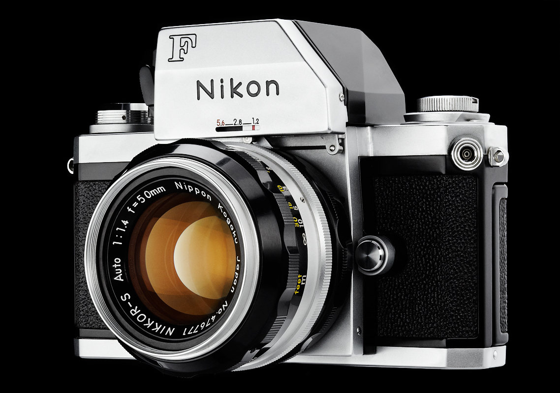 Nikon F FTN Camera